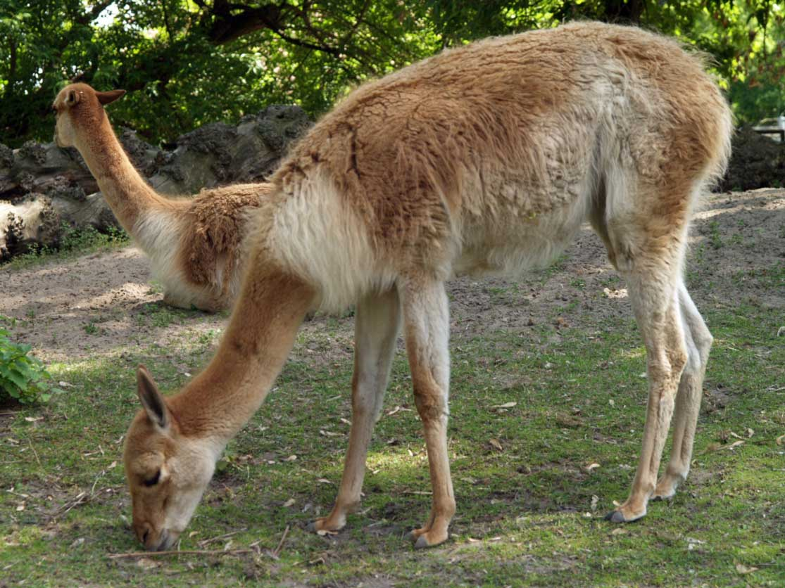 Vicuña